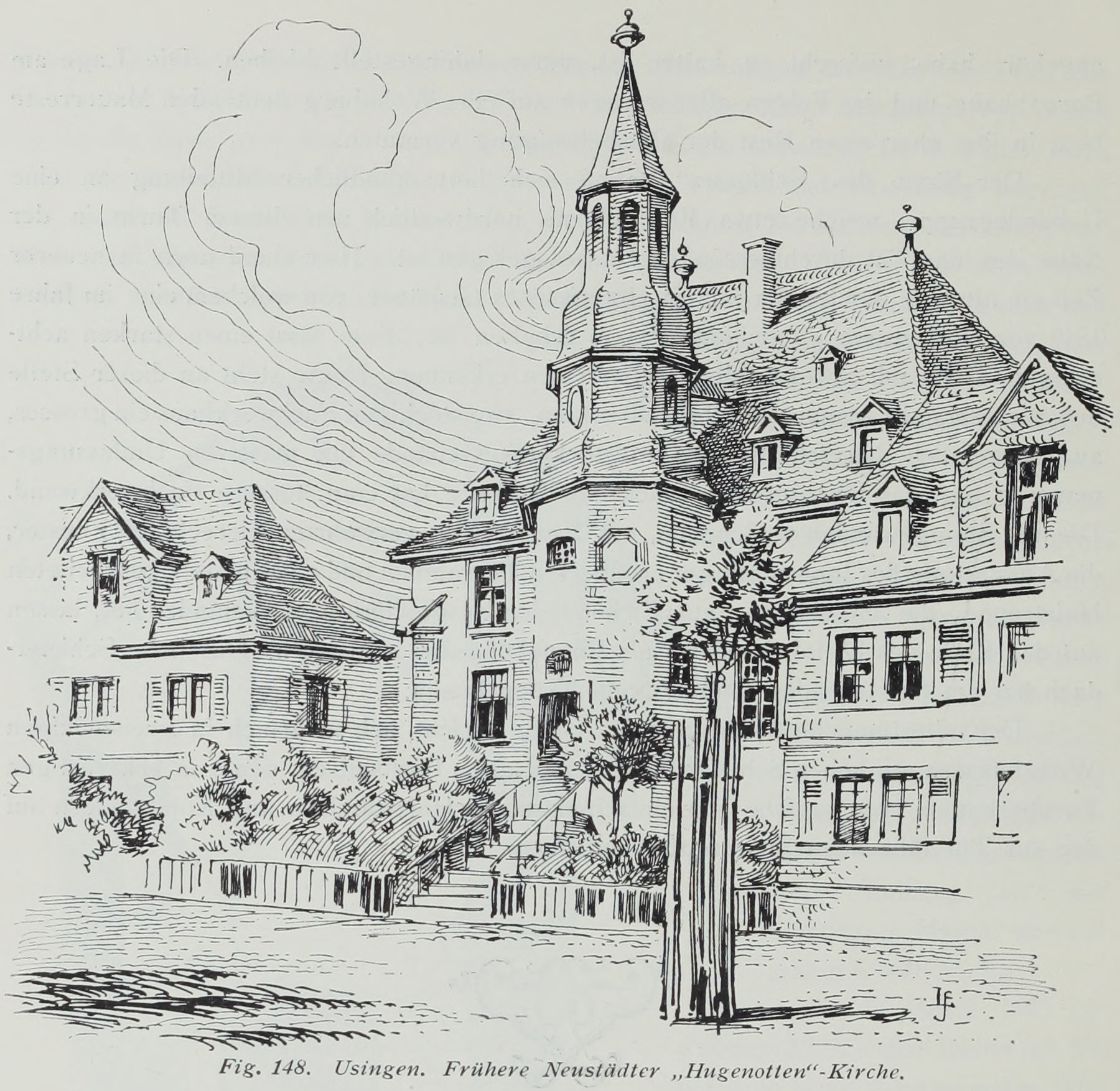 Usingen frühere Neustädter Hugenotten-Kirche